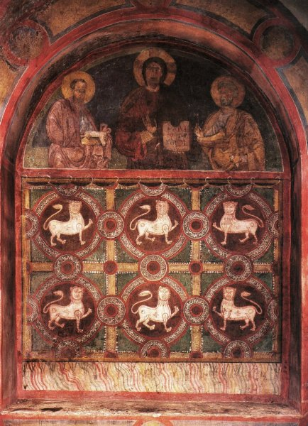 Materiali: affresco Collocazione: Chiesa di Santa Maria infra portas, Foligno Regione: Umbria Cultura: romanico